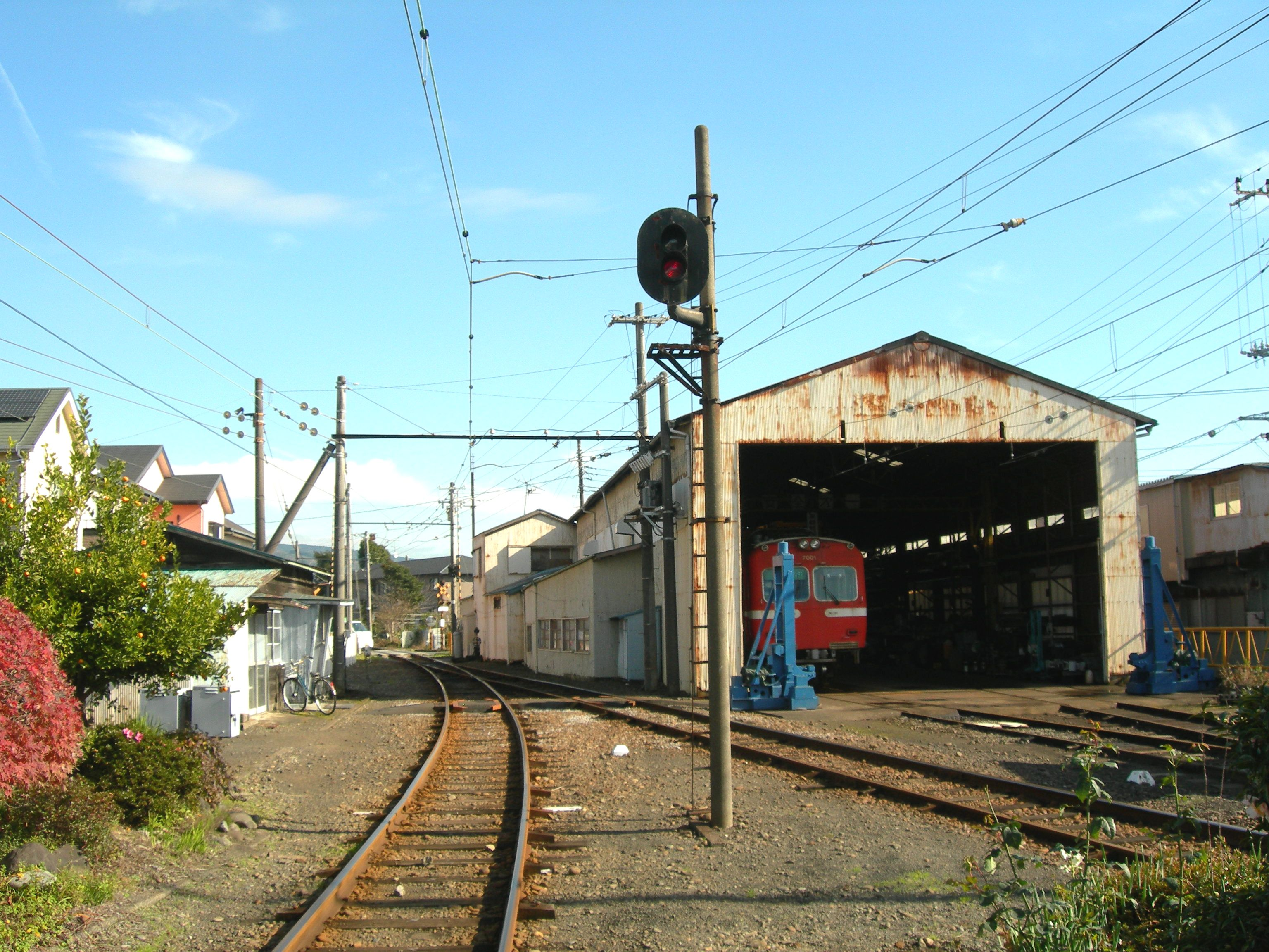 岳南富士岡駅 車両検査場